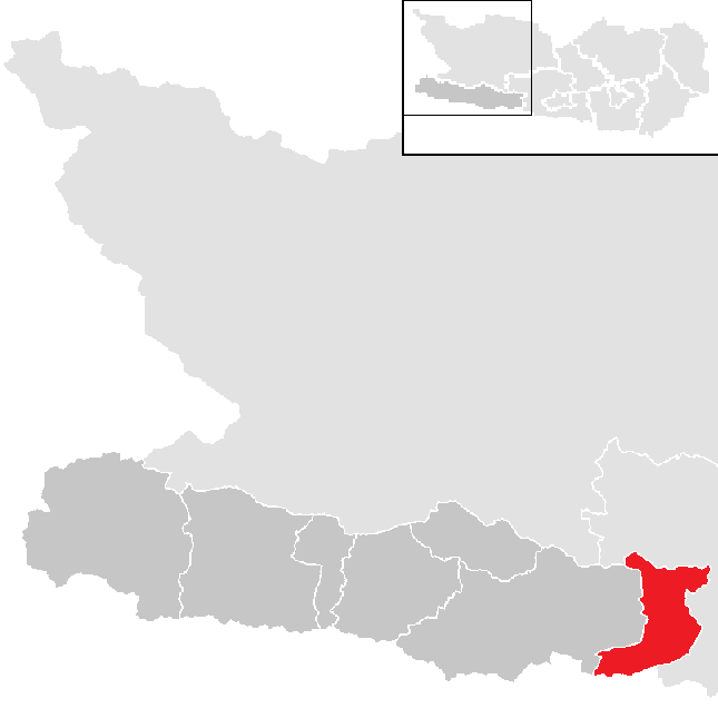 Bezirk Hermagor